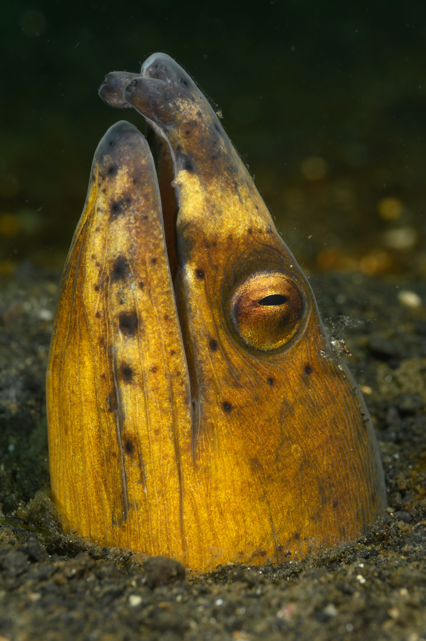 Blacksaddle Snake Eel,Lembeh Strait,Ophichthus cephalozona,Schlangenaal